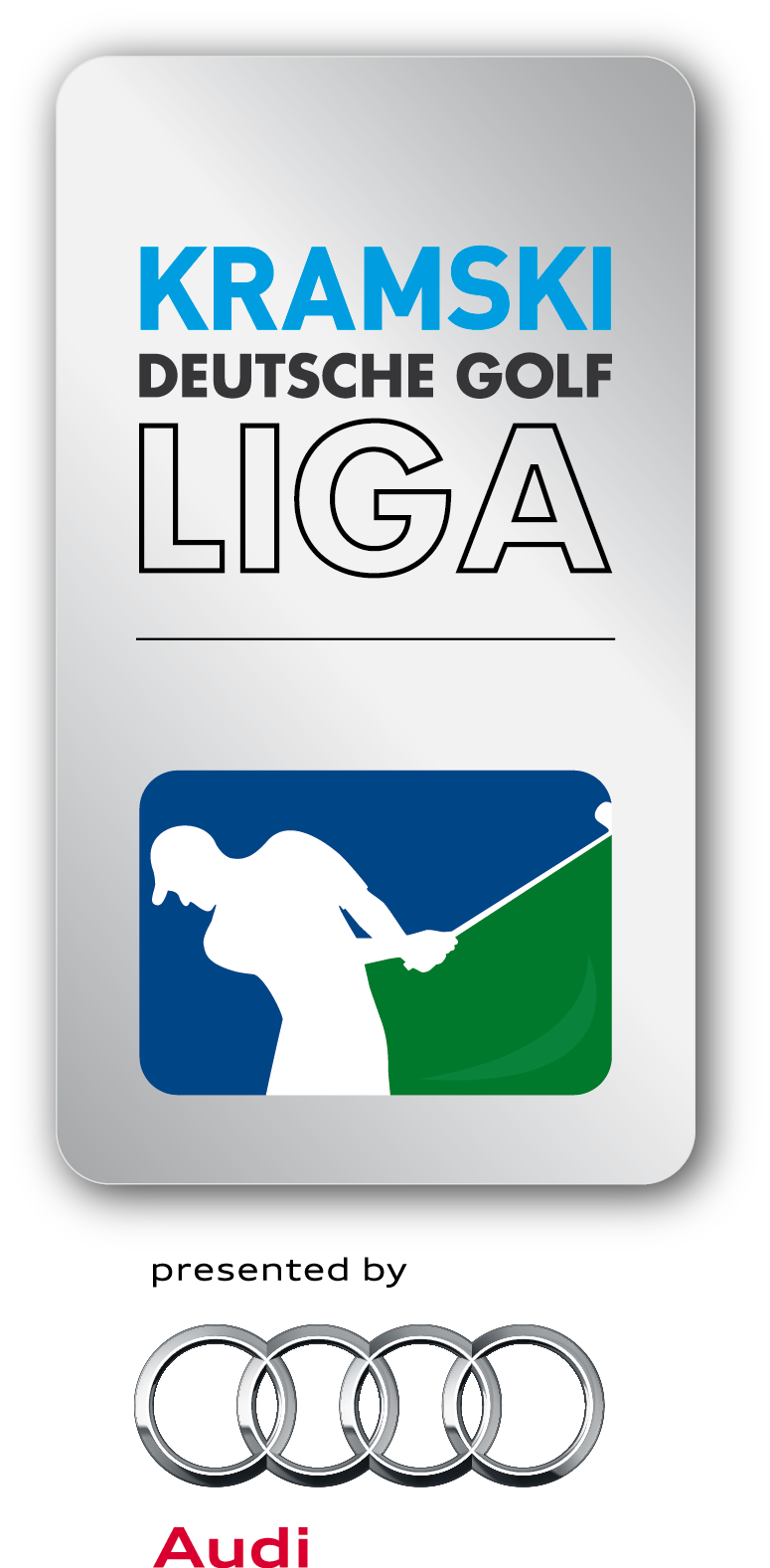 Offizielles Liga-Logo